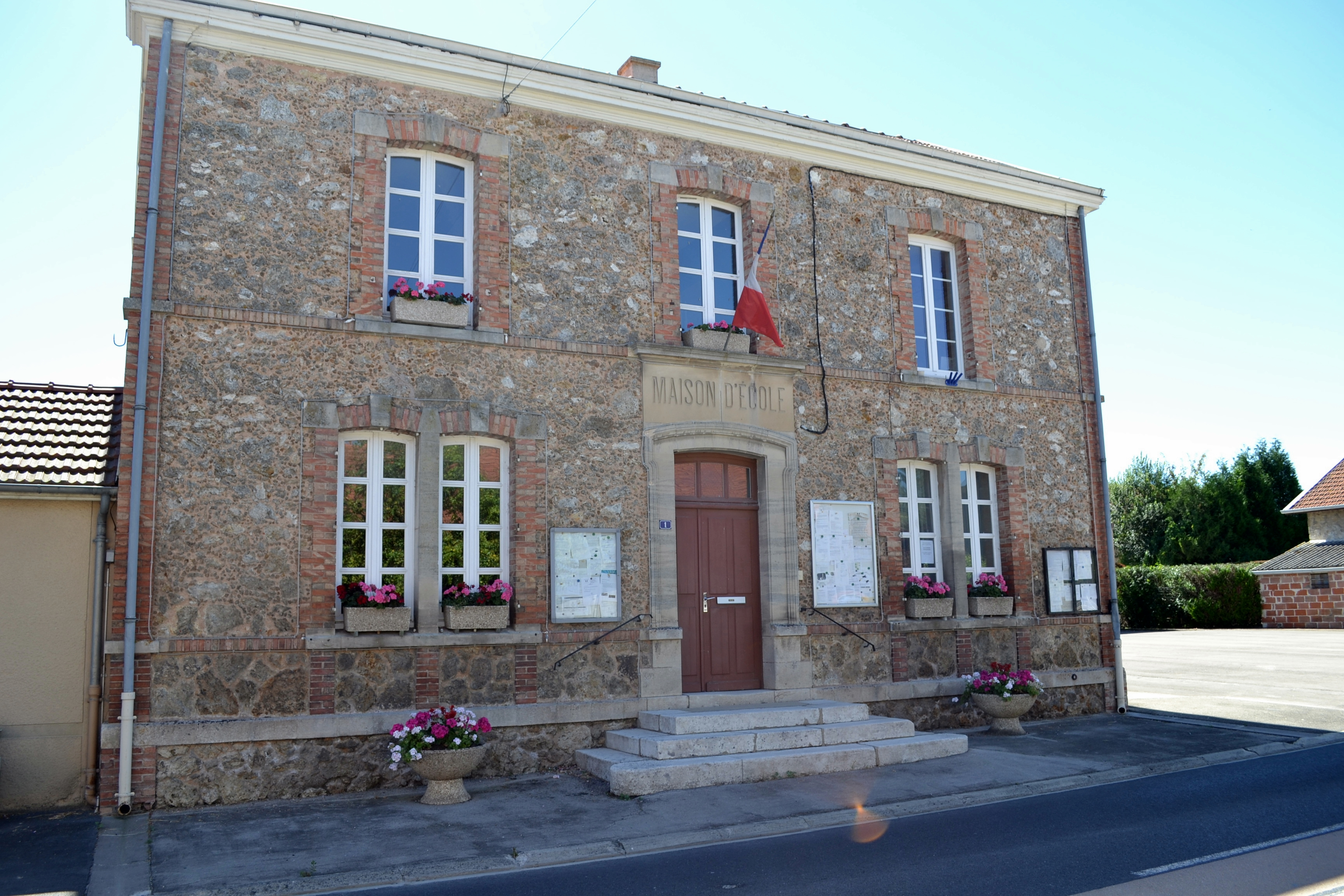 Mairie de Saint-Jean-sur-Moivre (51).